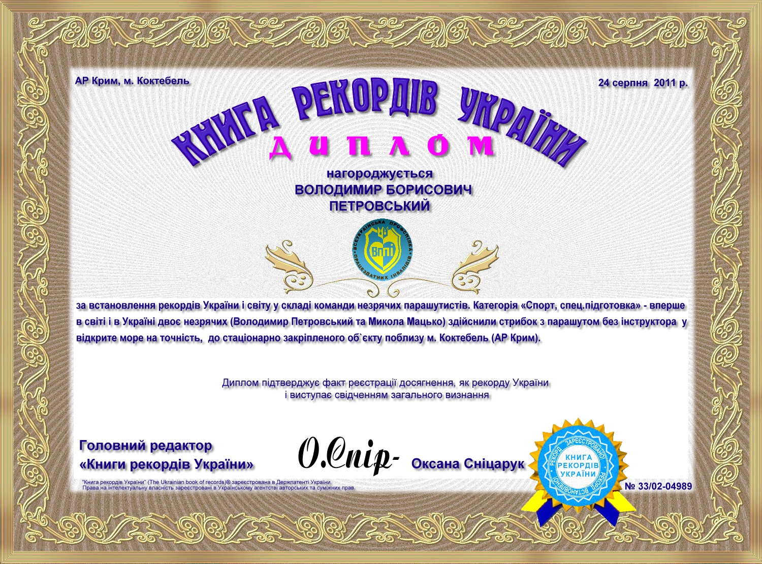 24 серпня 2011 року, в День Незалежності України, поблизу міста Коктебель (АР Крим, Україна) двоє незрячих парашутистів, одним з яких був В.Б. Петровський, самостійно, без інструктора, не в тандемі, здійснили стрибок у відкрите море на точність. Рекорд зафіксований Книгою рекордів України 24 серпня 2011 року